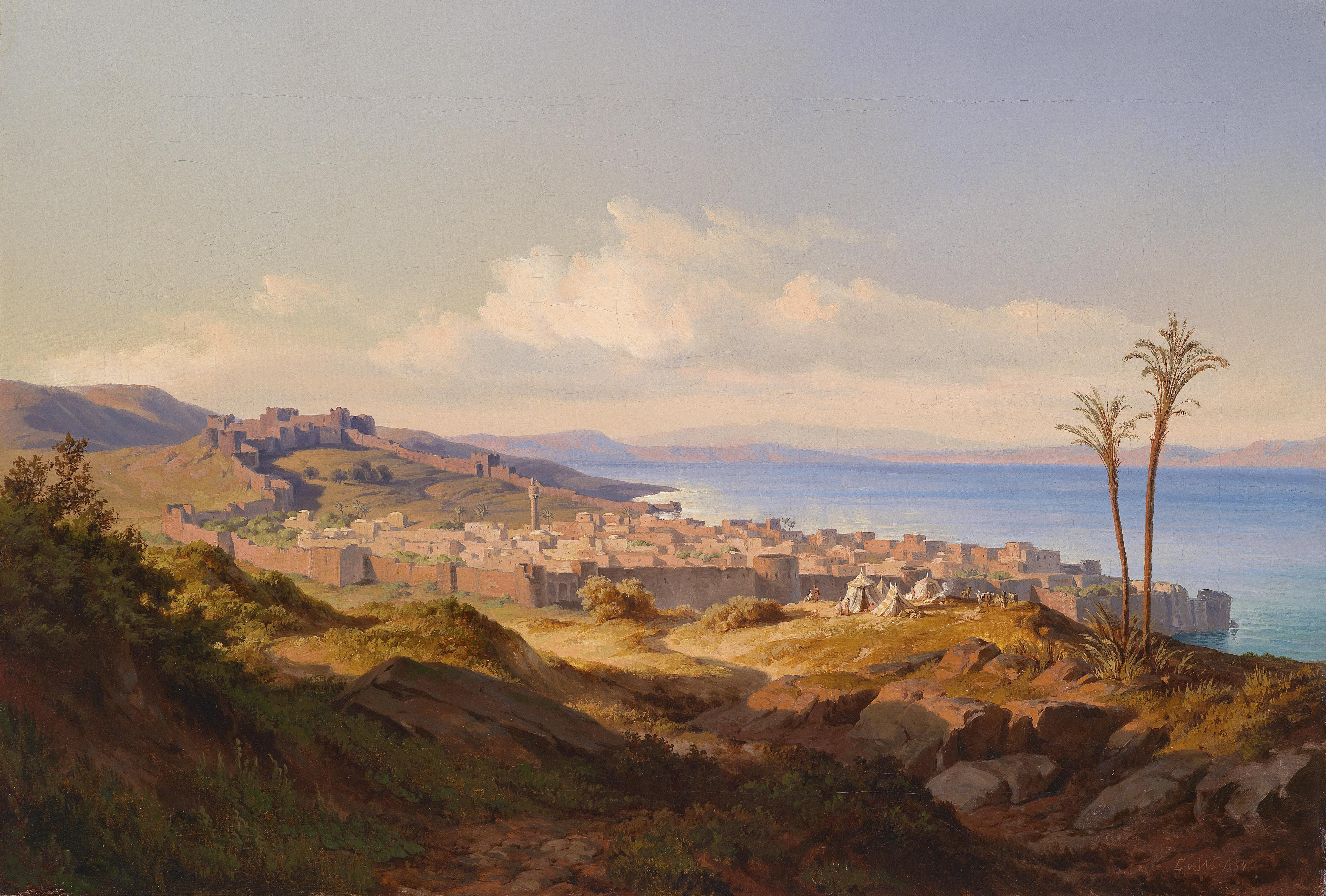 Stadt und See TiberiasTown and Lake Tiberiastitle QS:P1476,de:"Stadt und See Tiberias" label QS:Lde,"Stadt und See Tiberias"